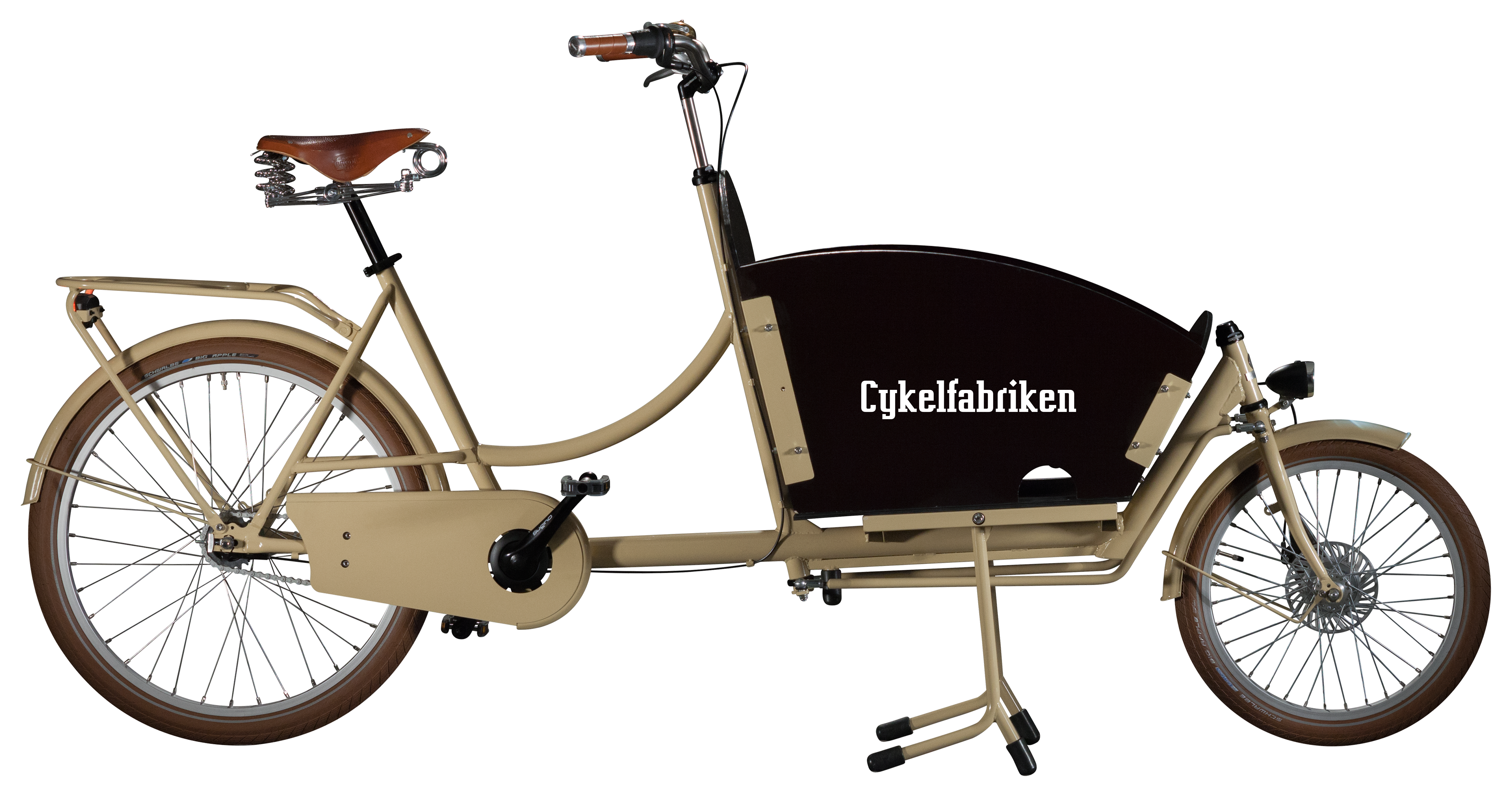 Tvåhjling lådcykel / Bakfiets från Cykelfabriken